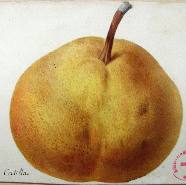 Catillac, poire, -32-, Alphonse Mas-1867- Le verger français.